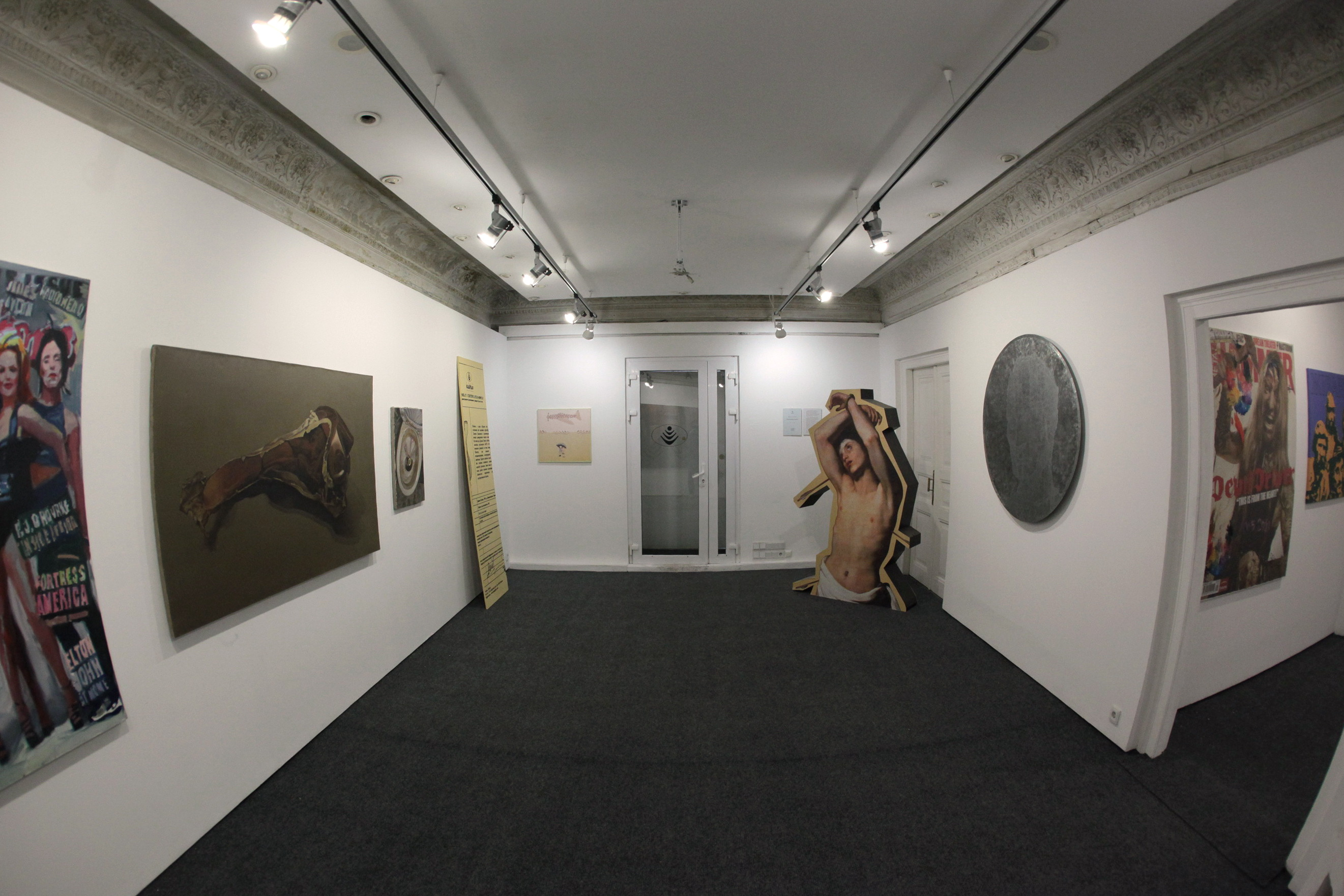 "Безвідповідальність", 2015